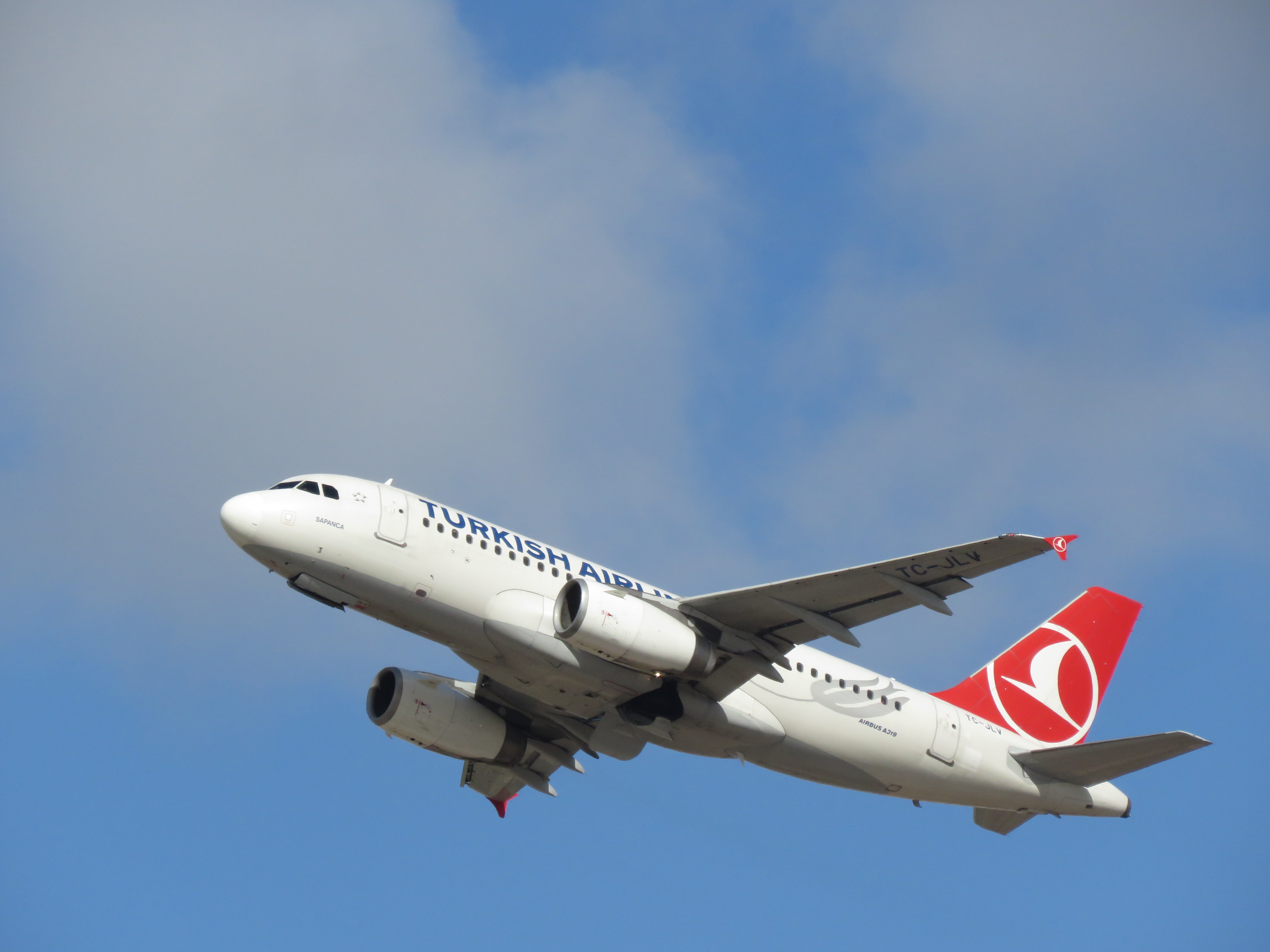 מטוס מסוג אירבס A319 של החברה ממריא מבן גוריון ב13.1.17.